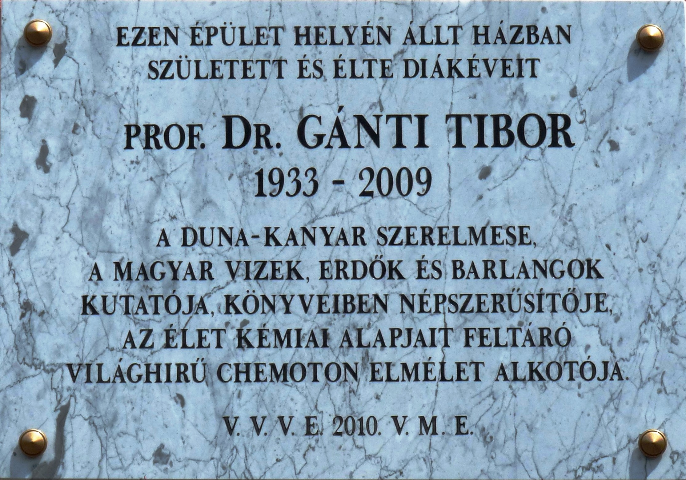 Gánti Tibor (1933 – 2009) vegyészprofesszor és természetkutató, a kemotonelmélet megalkotójának emléktáblája az egykori szülőháza helyén emelt új épület homlokzatán. Vác, Köztársaság út 5.